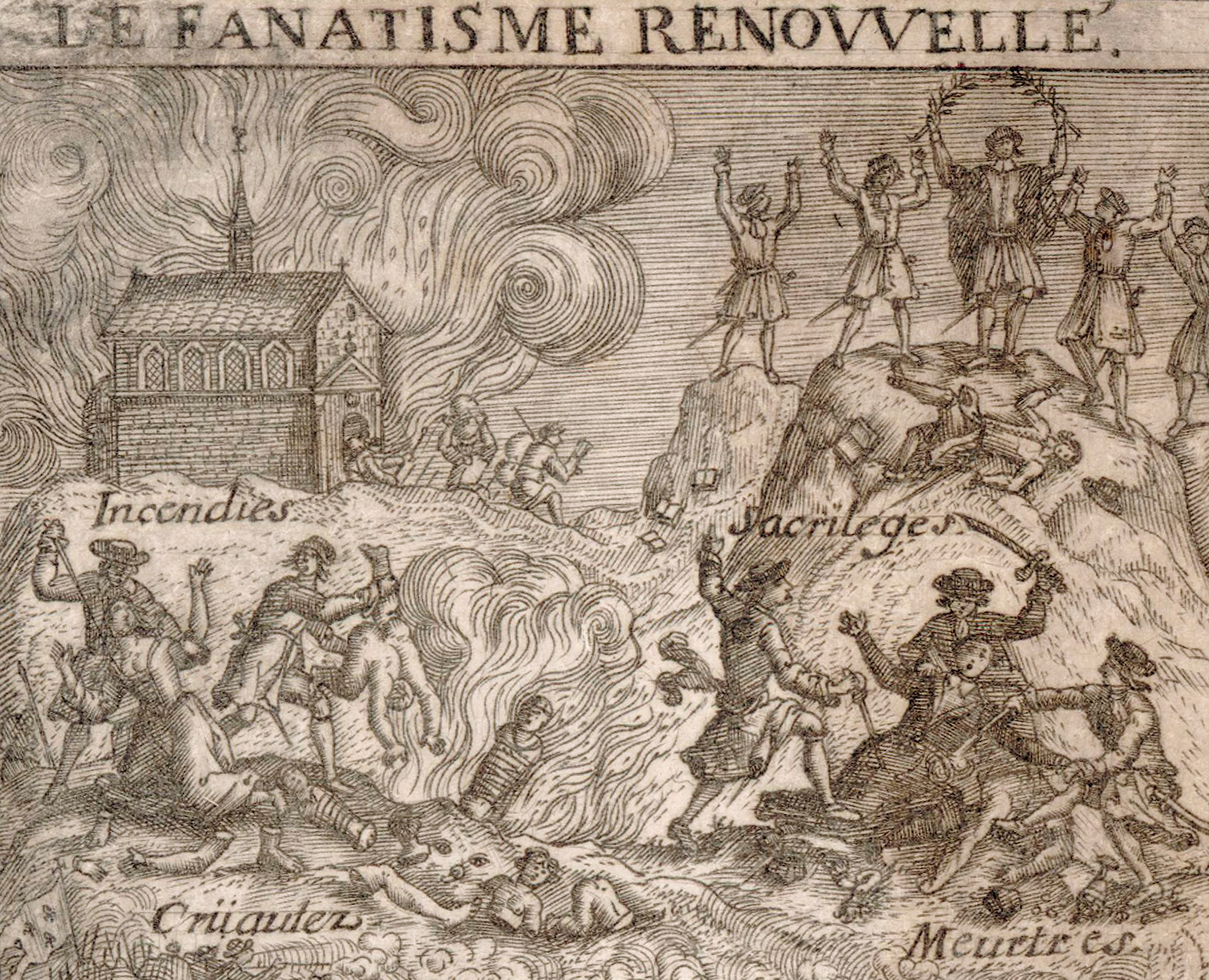 Gravure